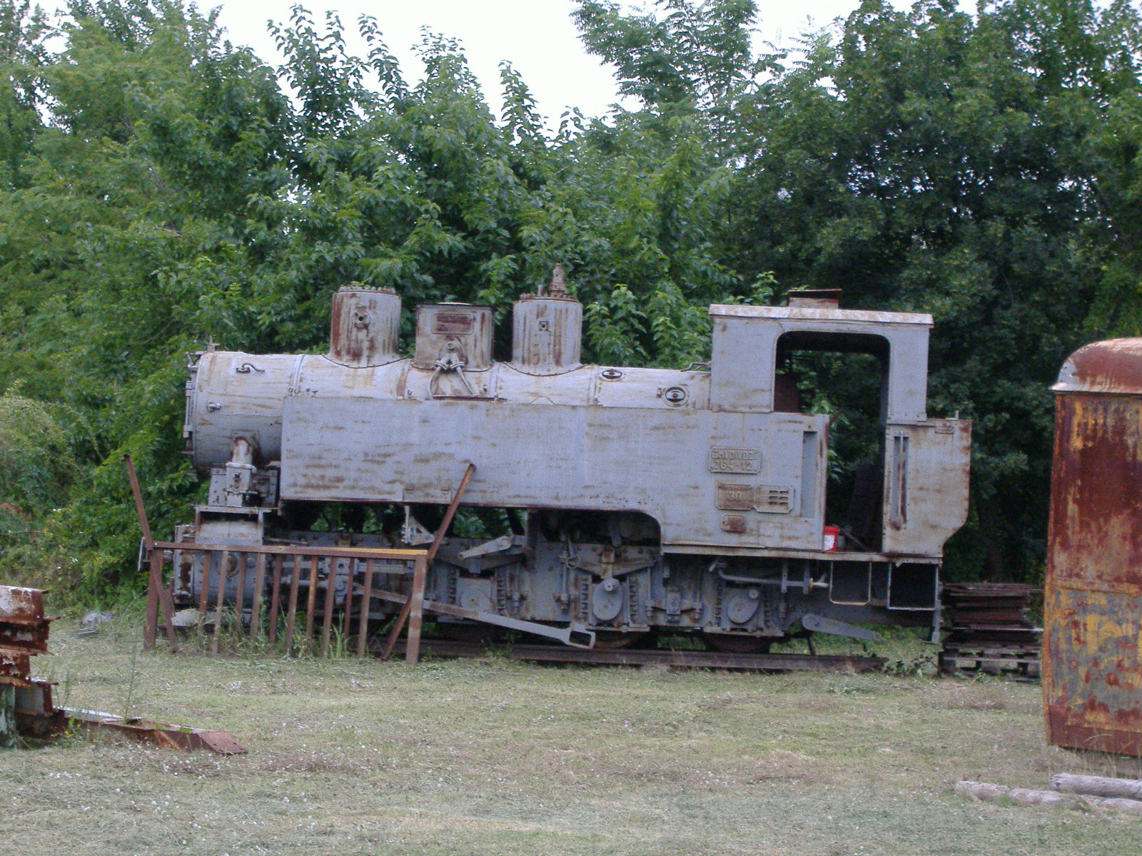 Romániából származó, korábban Vésztőn tárolt mozdony egy békéscsabai telephelyen az Ipari úton. Magyar pályaszámozási rendszer szerint a 490,2 sorozatba tartozik. Egyes hírek szerint ki lesz állítva és az AEGV/MÁV AK-nak fog emléket állítani.